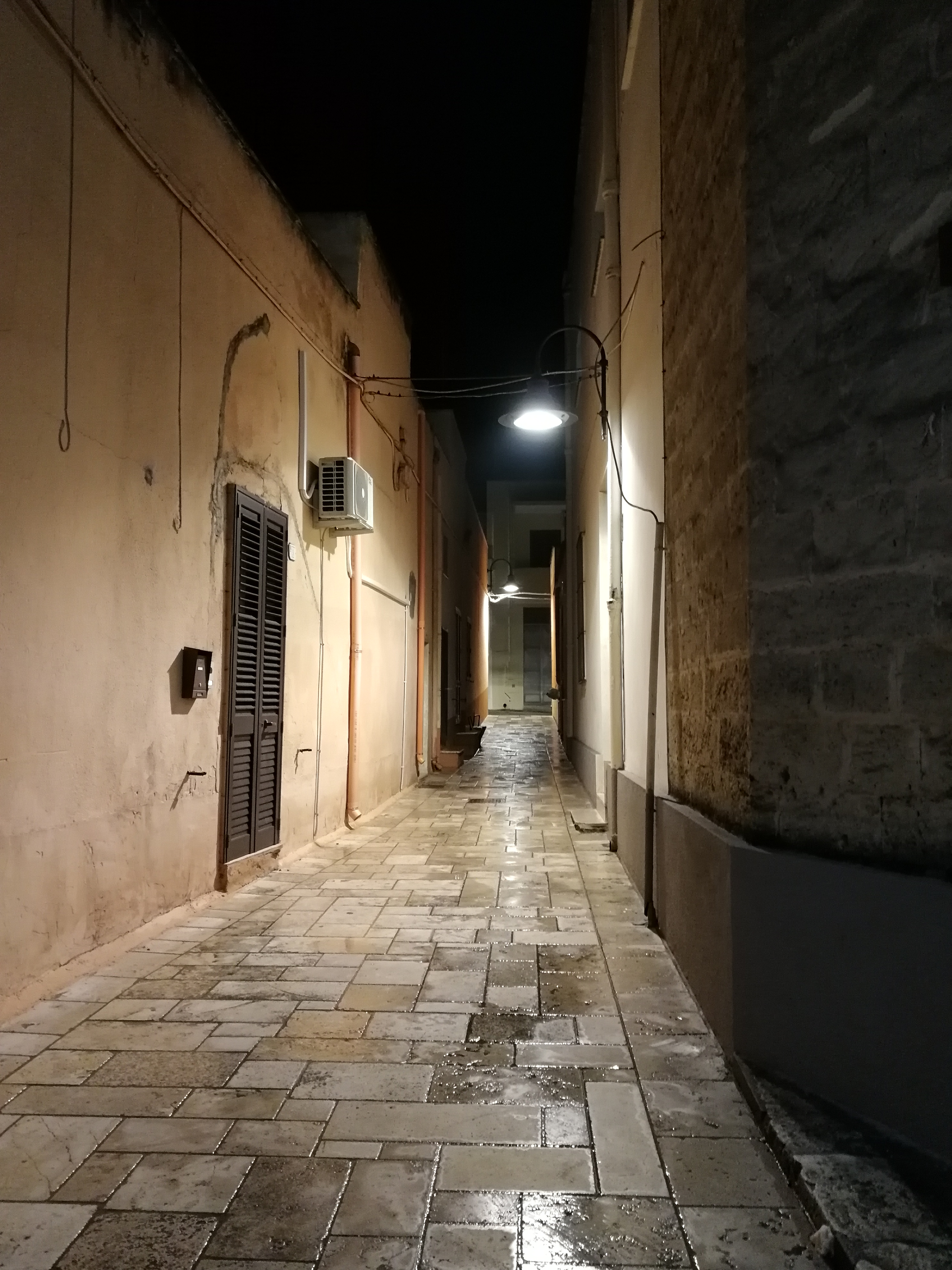 Particolare vico Trinità